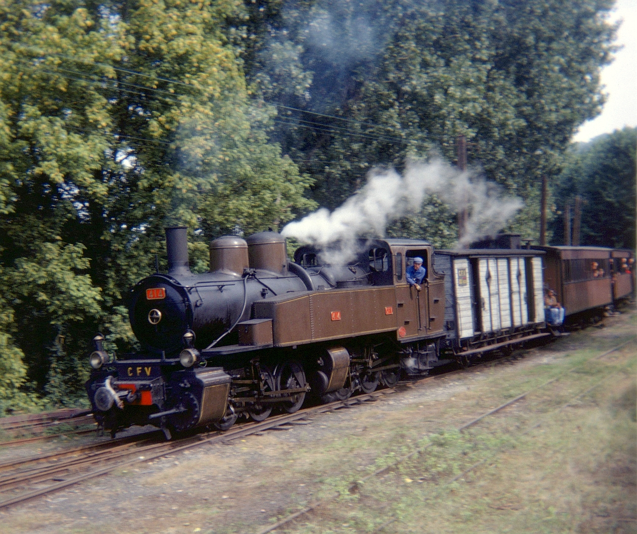 La locomotive Mallet N°414 du chemin de fer du Vivarais, arrive en gare de Lamastre (Ardèche) le 21 septembre 1975.